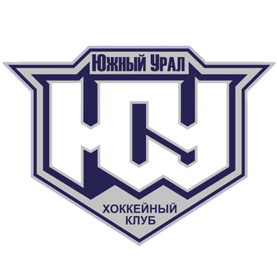 Башҡортса: Южный Урал хоккей клубы